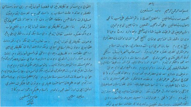 رسالة السلطان عبد الحميد الثاني لشيخه محمود أبو الشامات.